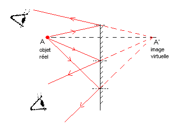 Schéma : image donnée par un miroir plan (schéma personnel) Catégorie:Schéma de physique